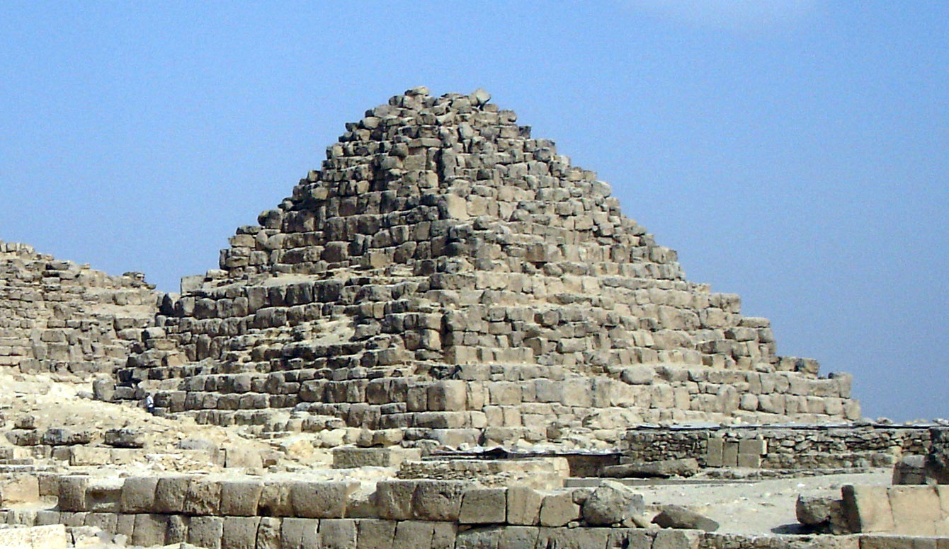 Queen Pyramids of Henutsen G1c